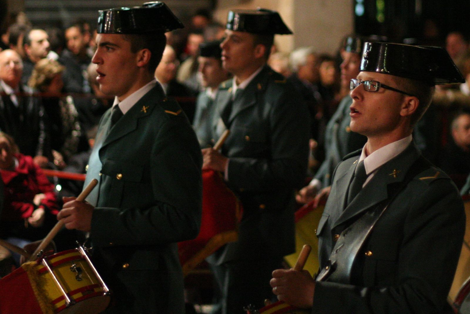 Miembros de la banda de Música de la Academia de la Guardia Civil de Baeza durante la procesión de la Vera-Cruz (o de los civiles) el Jueves Santo de 2008 en Jaén.